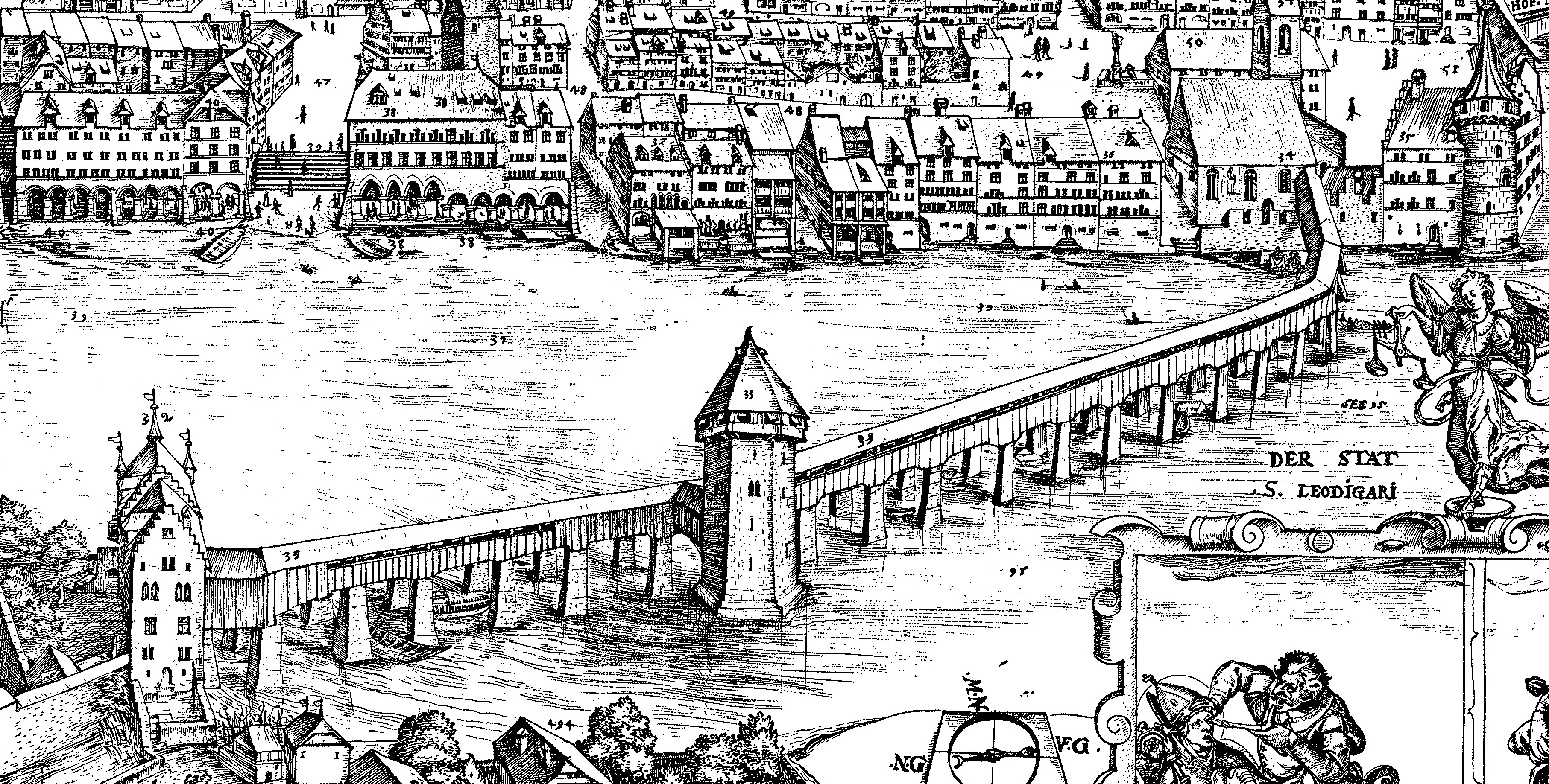 Der Freienhof in der Luzerner Stadtansicht von Martin Martini